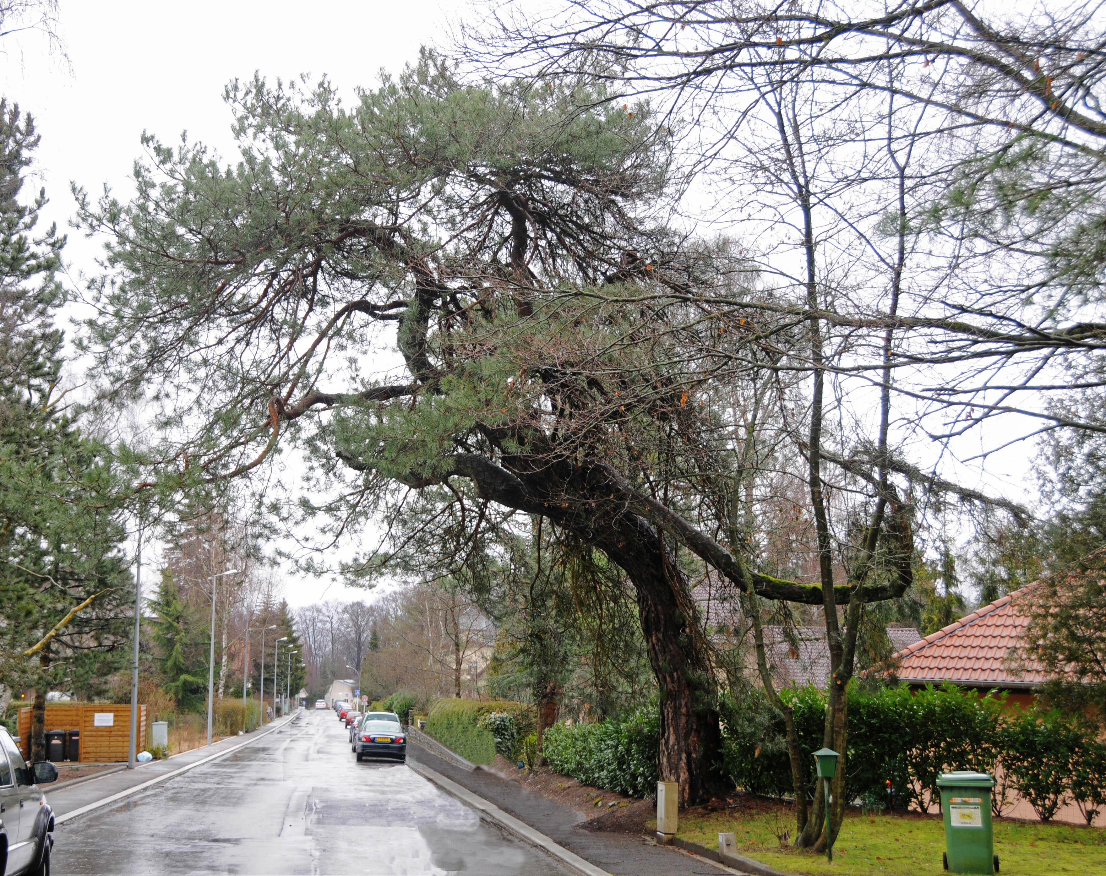 Kifer um Briddel.